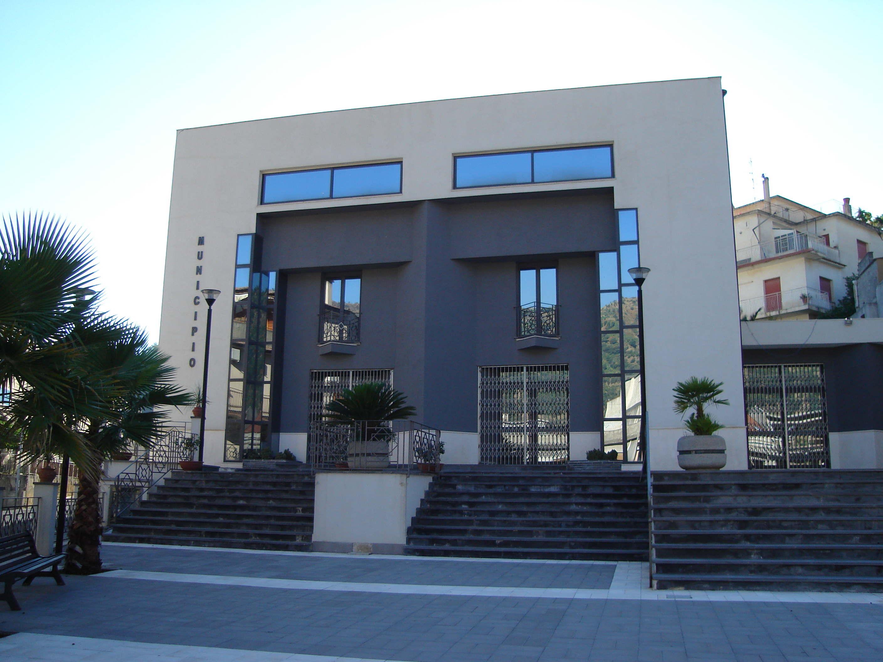 Municipio di Graniti, Messina, Sicilia